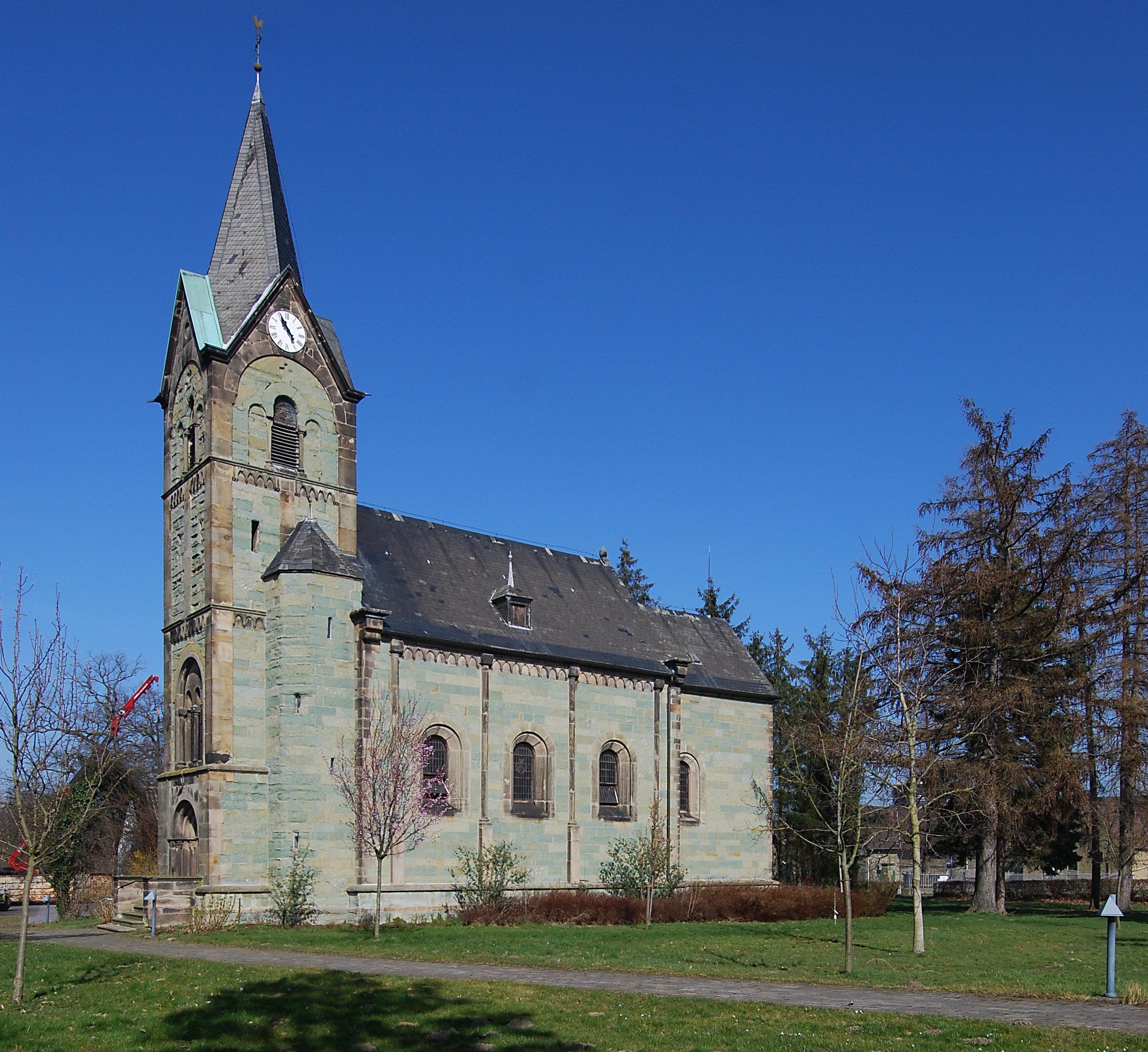 Kapelle St. Joseph in Ostuffeln zur Stadt Werl im Kreis Soest in Nordrhein-Westfalen This is a photograph of an architectural monument.